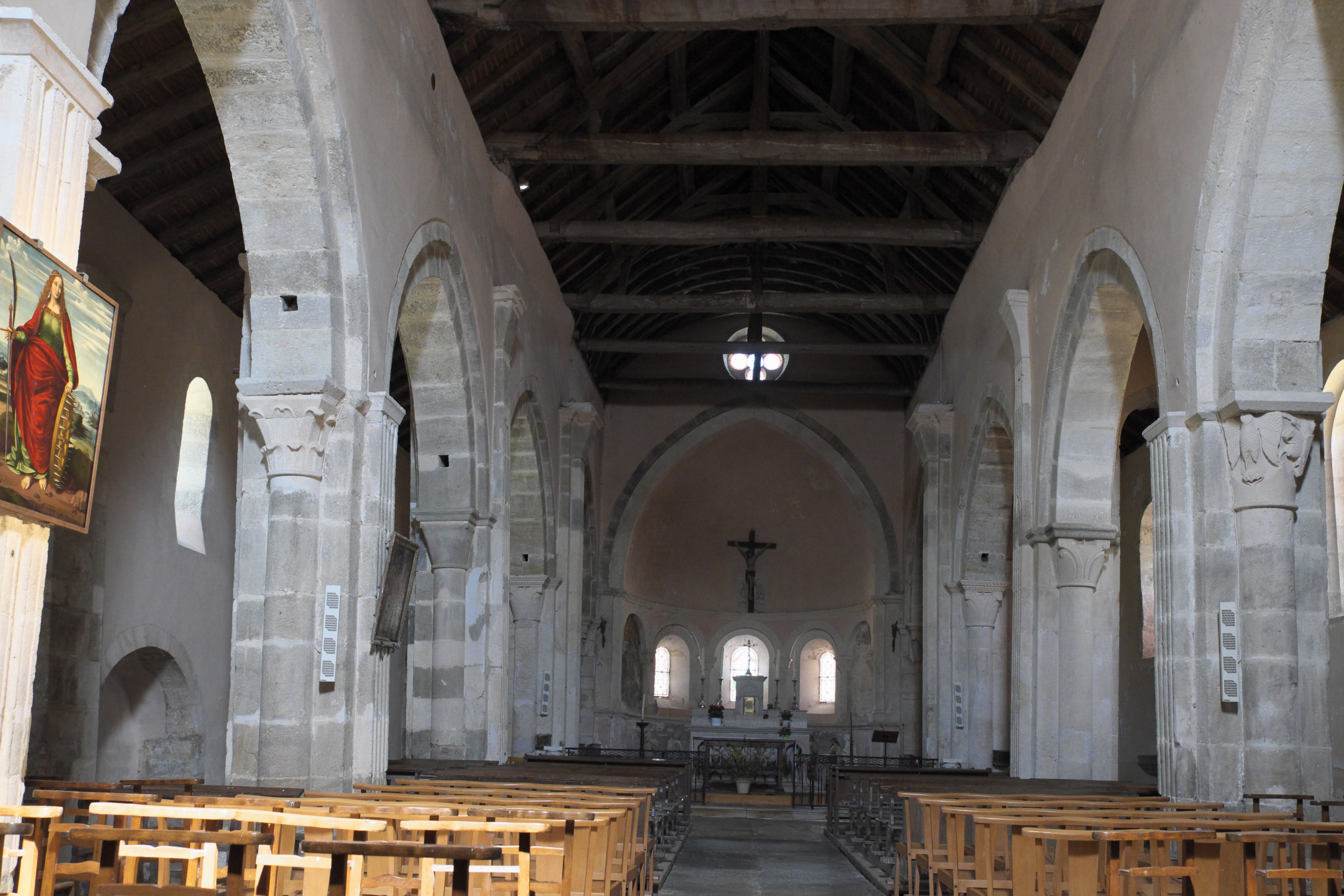 Katholische Pfarrkirche Notre-Dame-de-la-Nativité, früher Saint-Georges, in La Rochepot im Département Côte-d’Or (Bourgogne-Franche-Comté/Frankreich), Innenraum